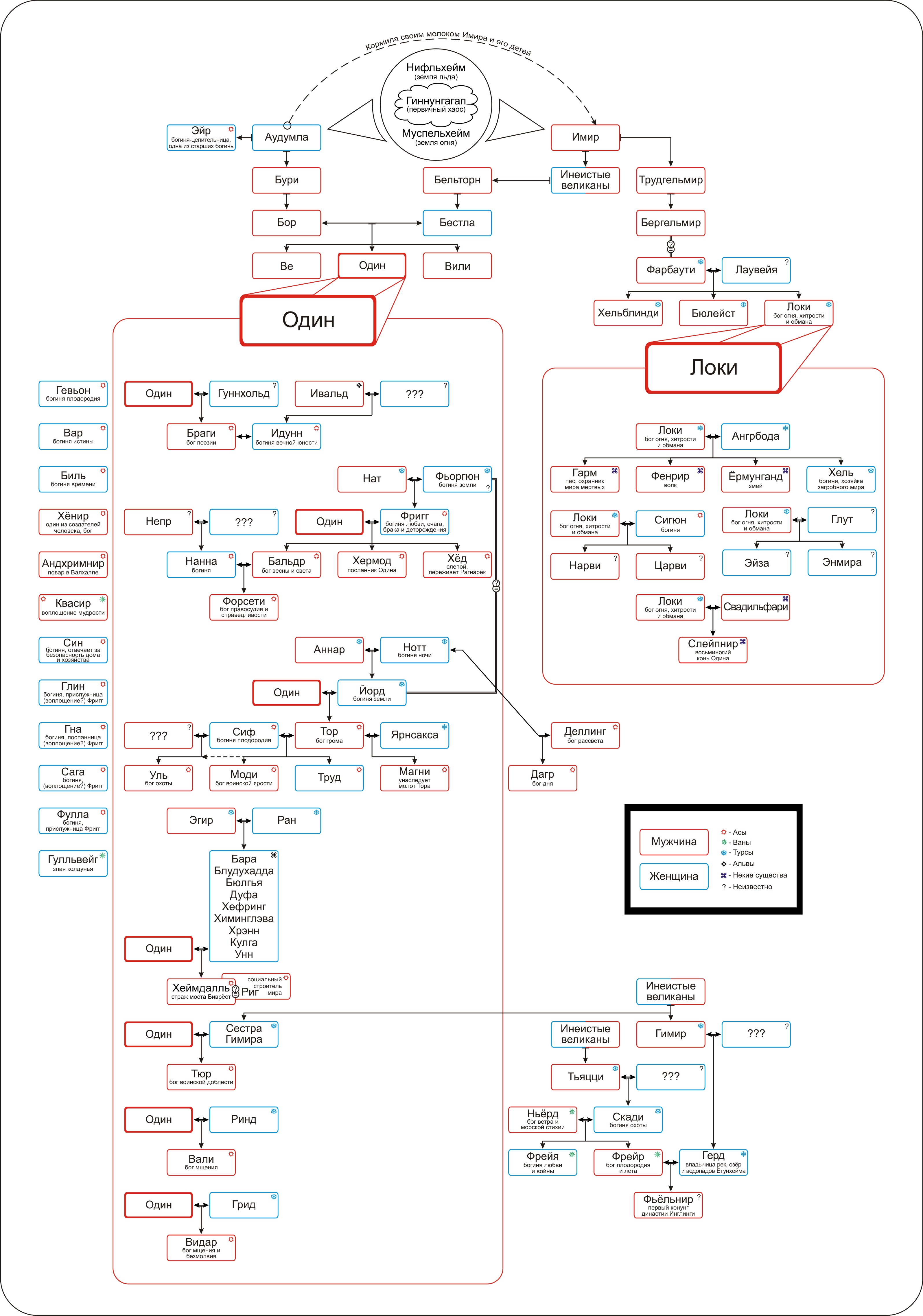 Какие-то данные, такие как имена, связи и род деятельности могут отличаться от тех, к которым привыкли другие люди. Это связано с тем, что по некоторым вопросам существует несколько научных интерпретаций одного и того же факта. Я использовал первую понравившуюся мне интерпретацию. Поэтому древо создано с некой долей моего субъективного ИМХО.